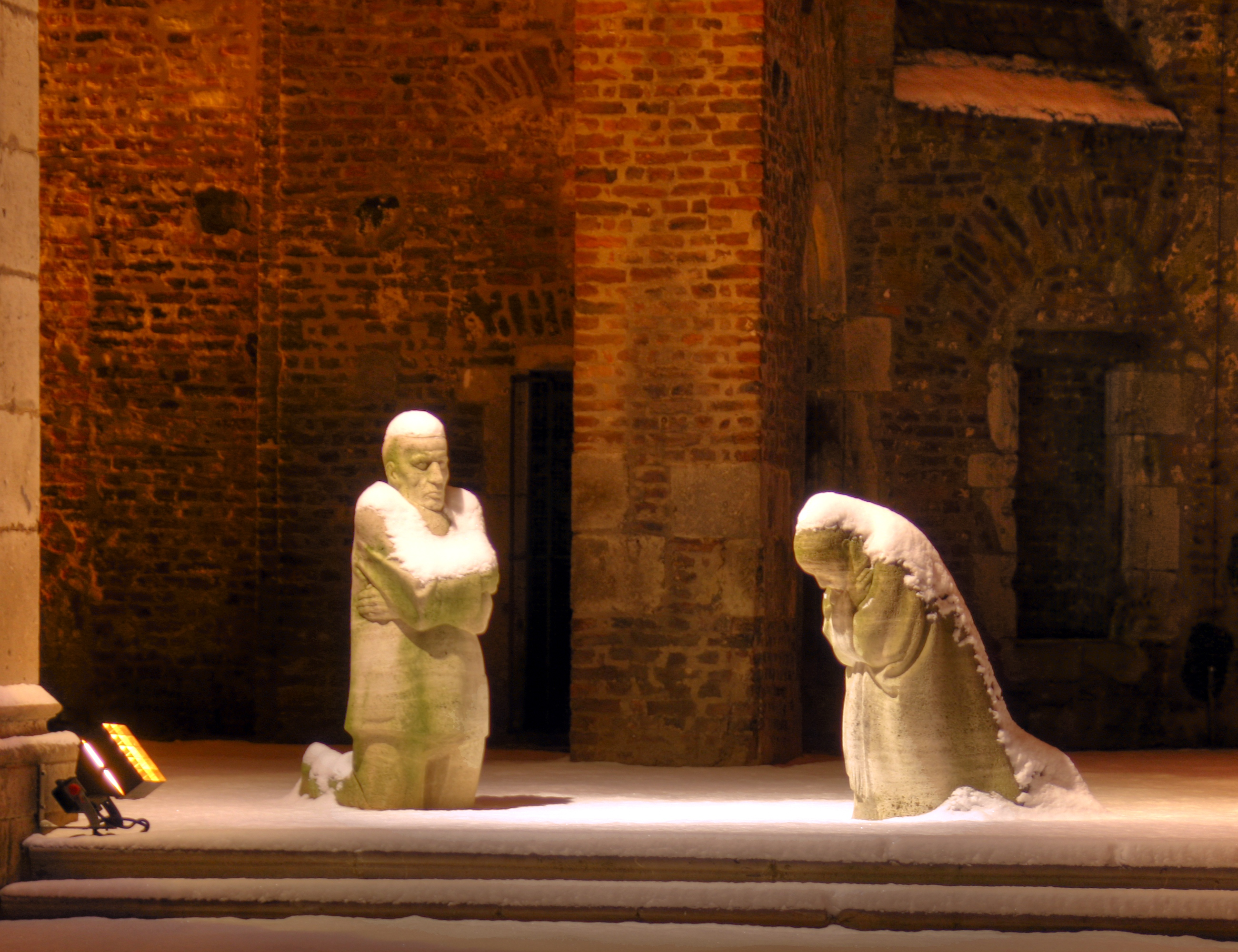 Vater und Mutter (Trauerndes Ehepaar)